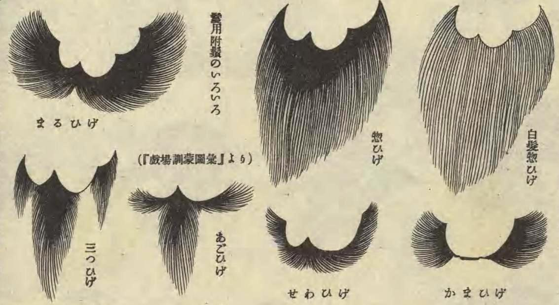 付け髭各種。劇場用。Beards for Kabuki, Japanese Dance-Drama